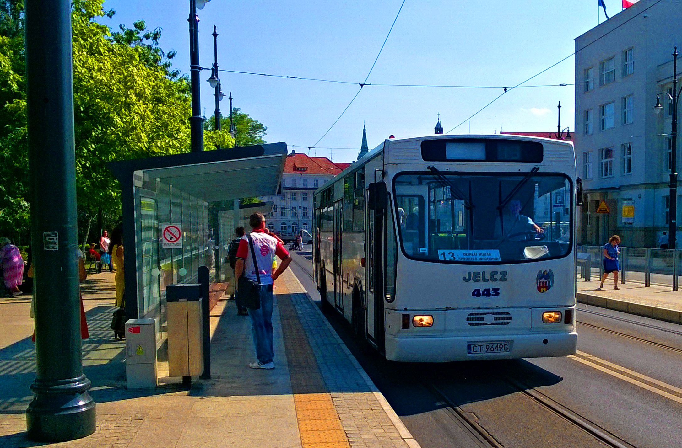 Jelcz 120M w Toruniu